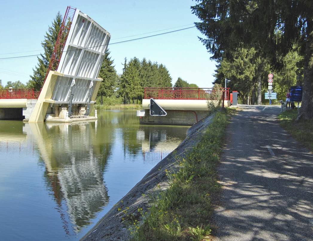 Bewegliche Brücke über den Canal de la Marne. Aufgrund eines technischen Defekts war sie für mehrere Stunden blockiert.